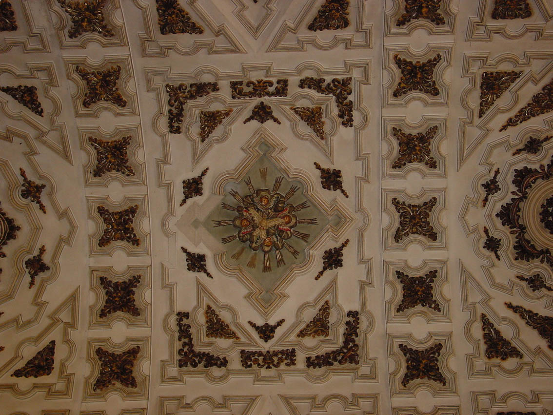 Bóveda de la sacristía de la iglesia de los Santos Juanes en Nava del Rey, Valladolid, España. Construida en el año 1733, con muros y bóvedas de medio punto y una exuberante y rica decoración con la traza de Alberto Churriguera.